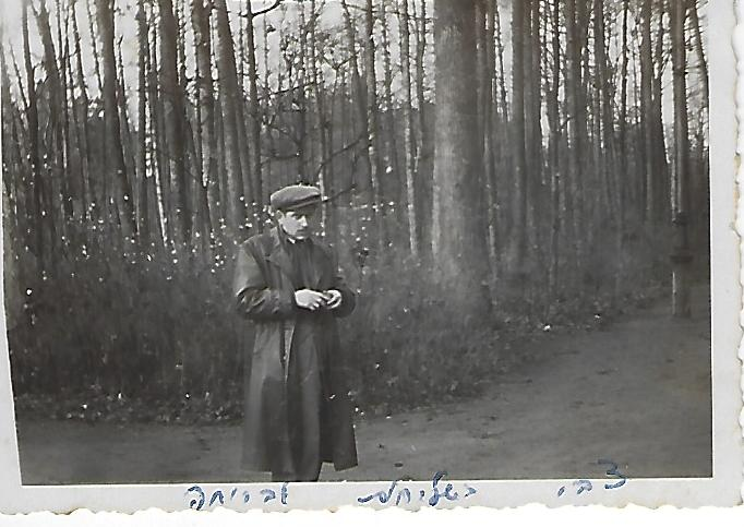 צבי נצר, בתקופת ארגון הבריחה, במעבר קודובה בין פולין לצ'כסלובקיה